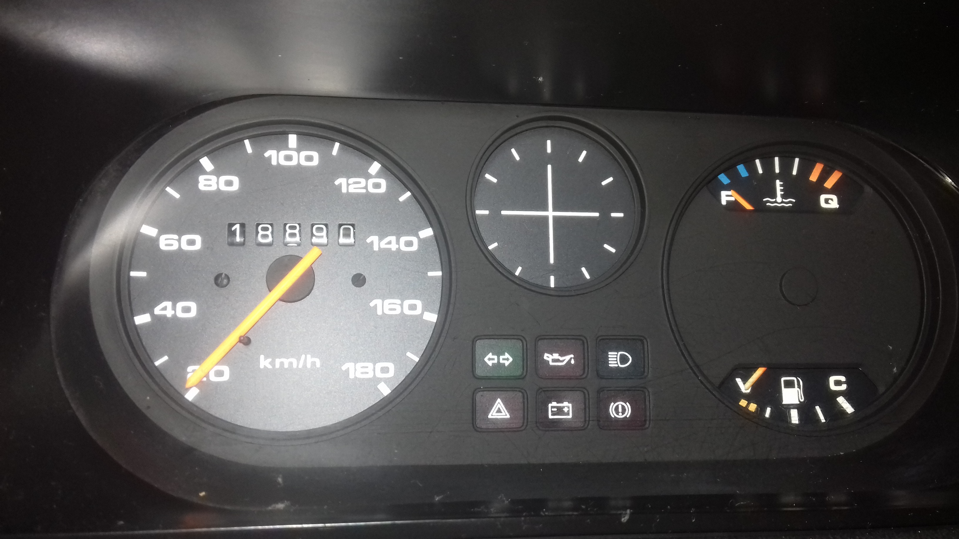 Painel de um Chevrolet Chevette L 1.6.